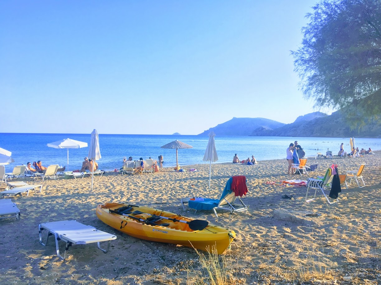 παραλία κώμης Χίου